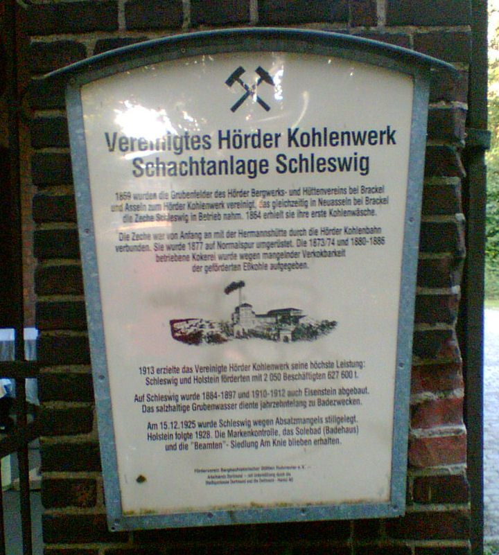 Vereinigte Hörder Kohlenwerke